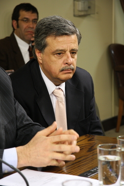 Sergio Aguiló, político chileno.